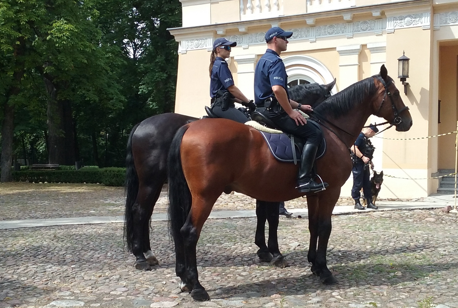 Patrol tomaszowskiej policji konnej. Tomaszów Mazowiecki w województwie łódzkim, PL, EU, CC0